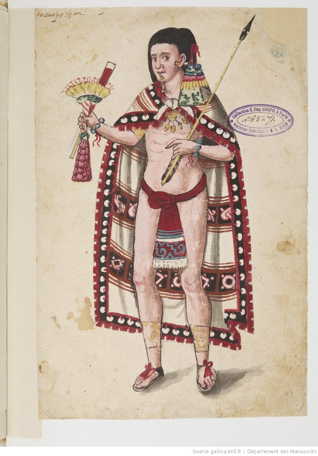 Fragment d'un Codex attribué par León y Gama à Don Fernando de Alva Ixtlilxochitl.